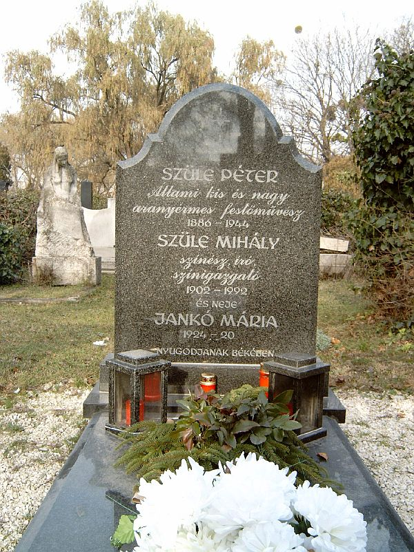 Szüle Péter (Cegléd, 1886. jún. 25. – Bp., 1944. febr. 4.) festő és Sárossy Szüle Mihály (Újpest, 1902. júl. 2.–Bp., 1992. jan. 23.) színész, színházigazgató, rendező, színpadi szerző sírja Budapesten. Kerepesi temető: 34-3-30.